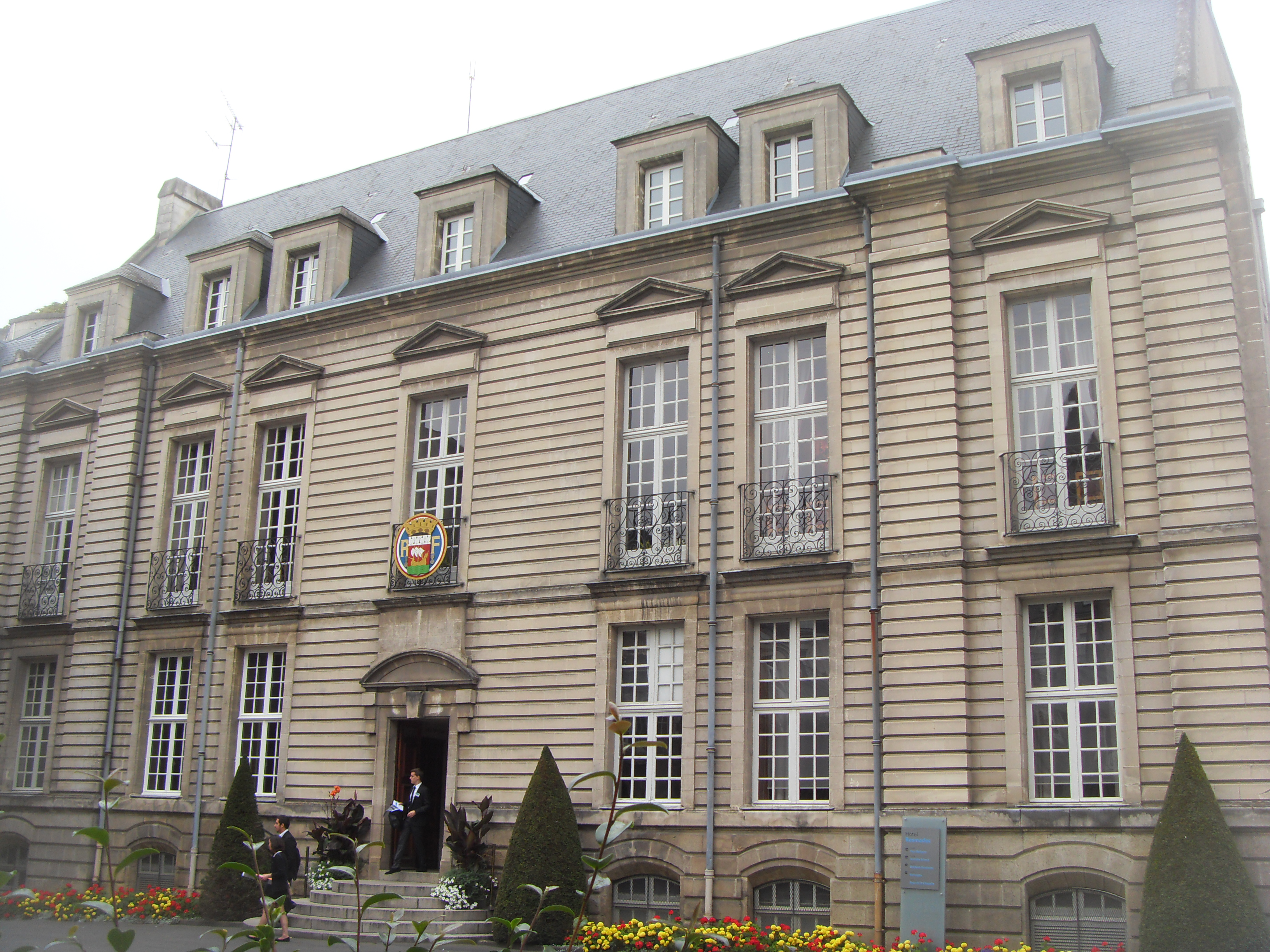 Hôtel de Rosmadec (Nantes)